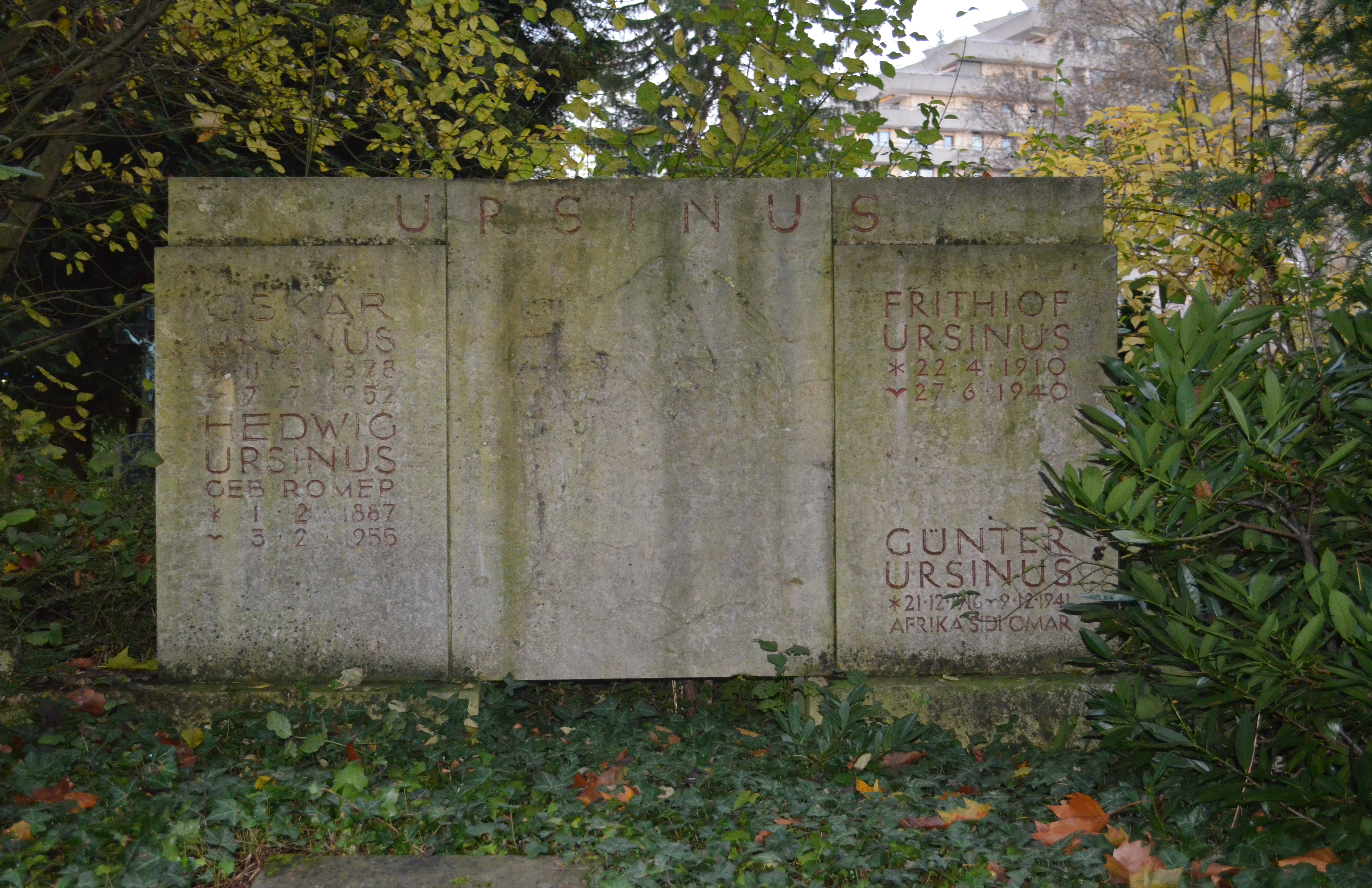 Frankfurt, Südfriedhof, B 1258, Grab Ursinus